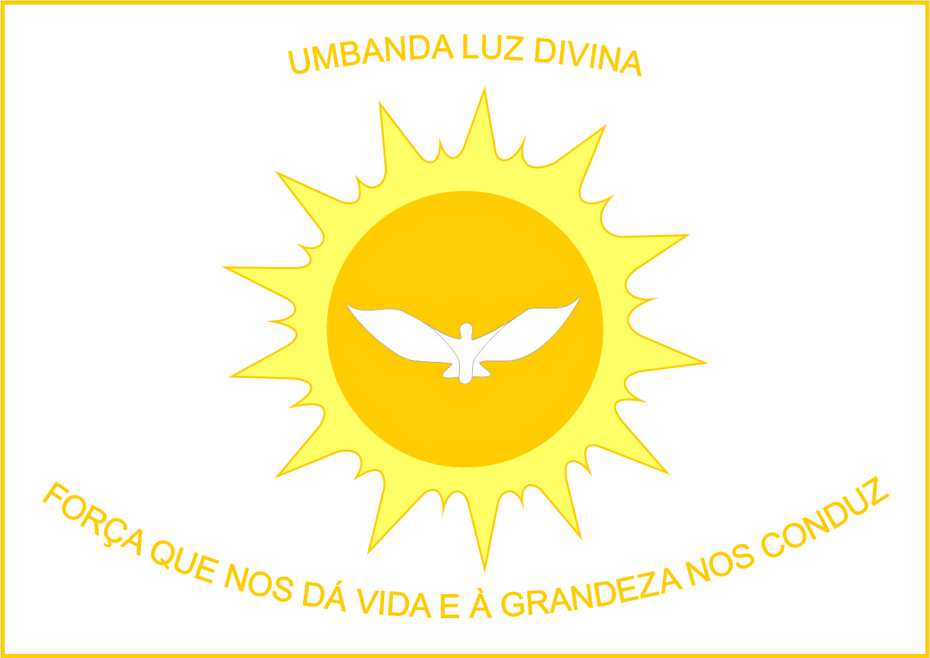 Símbolo criado pela Associação de Umbanda Caxias (AUC) para representar a Bandeira Nacional da Umbanda. É formado por um sol que representa a Luz Divina e um espectro humano saindo do núcleo solar, simbolizando a caminhada cósmica do ser humano rumo à sua evolução espiritual.